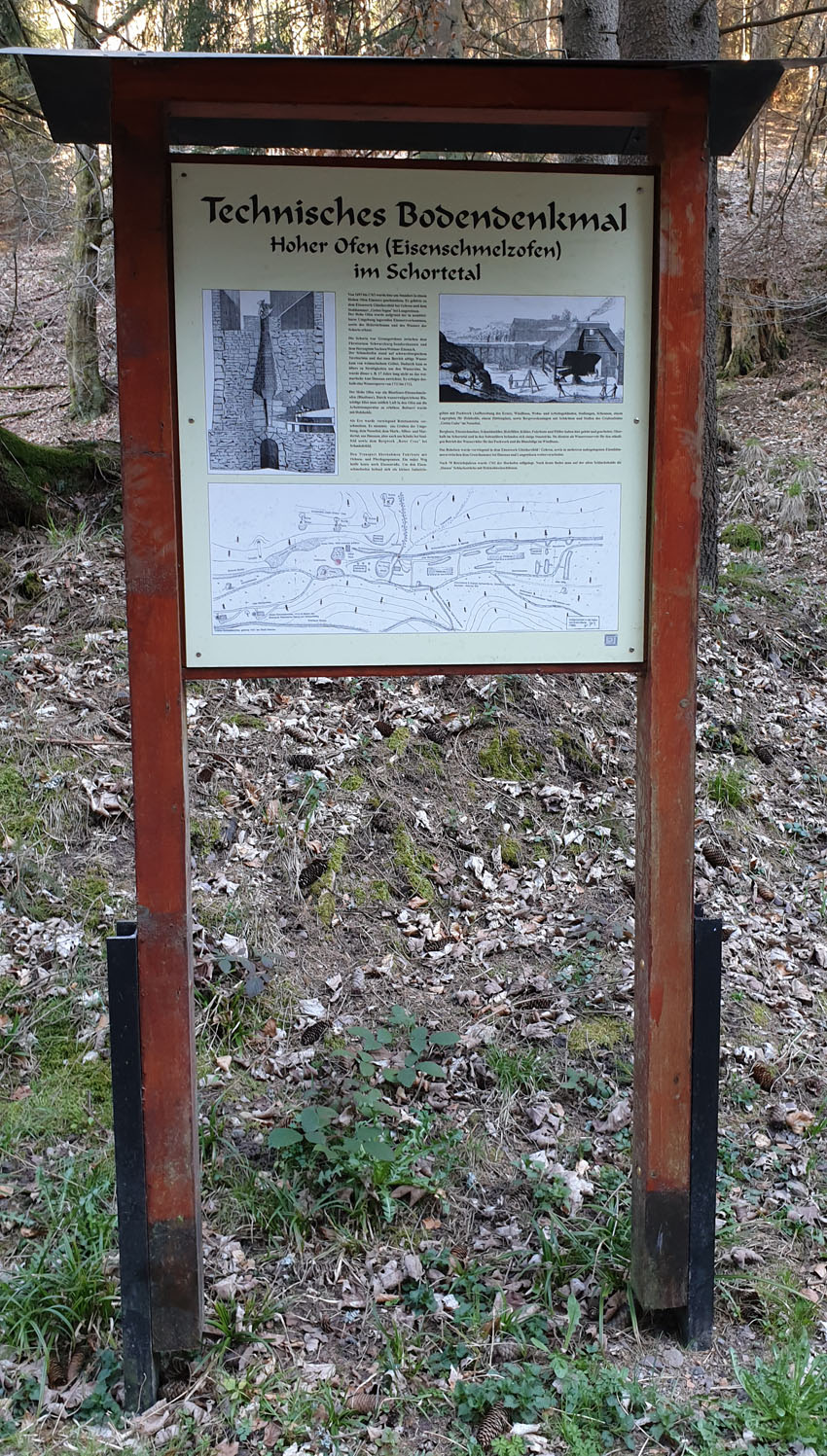 Informationstafel vor Ort, die die Historie des Ortes beschreibt